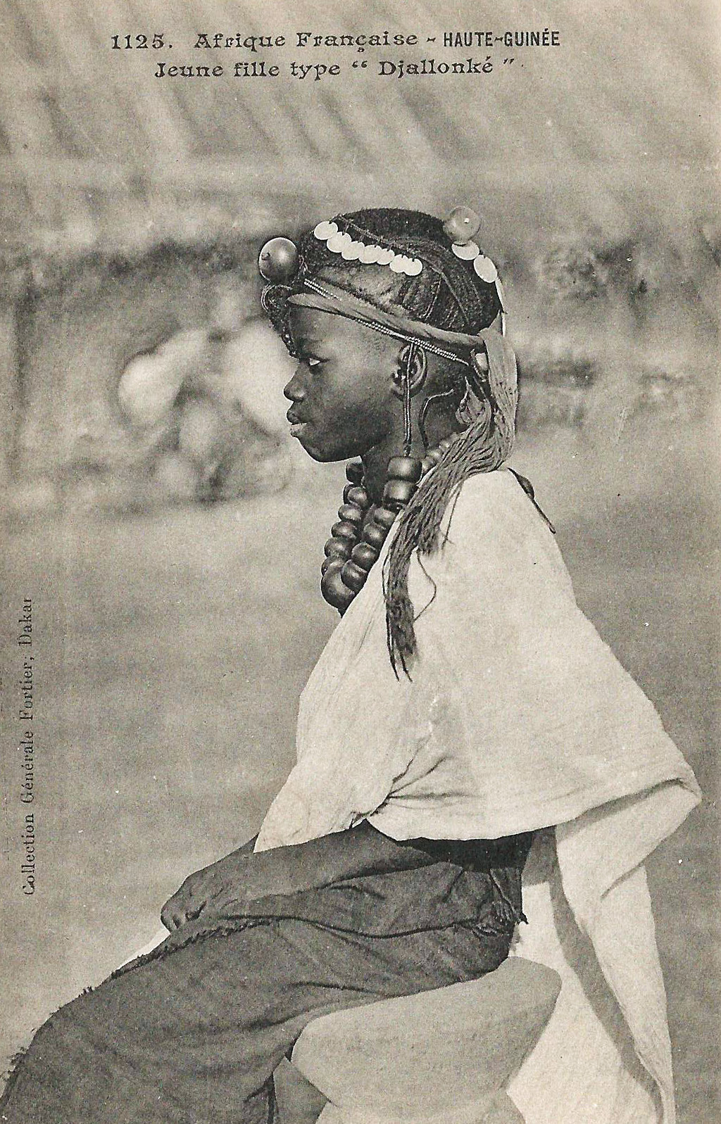 François-Edmond Fortier, Jeune fille type Djallonké. Afrique Française. Haute-Guinée